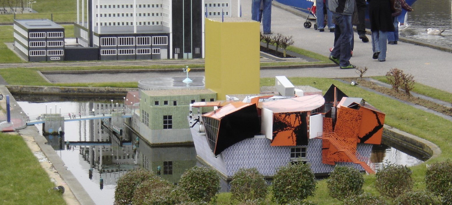 Groninger Museum, Madurodam, February 19, 2006